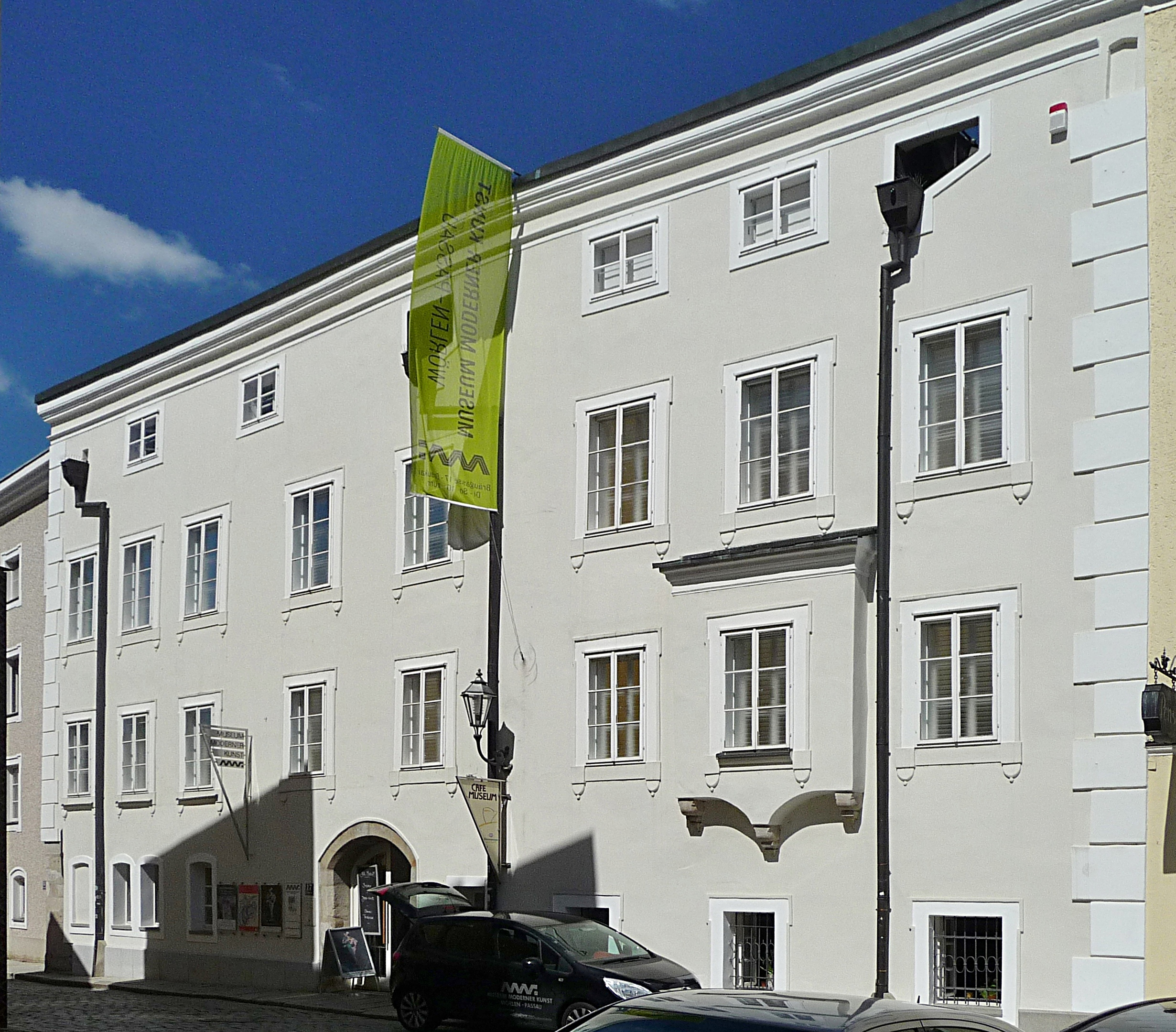 Das denkmalgeschützte Gebäude Bräugasse 17 in Passau